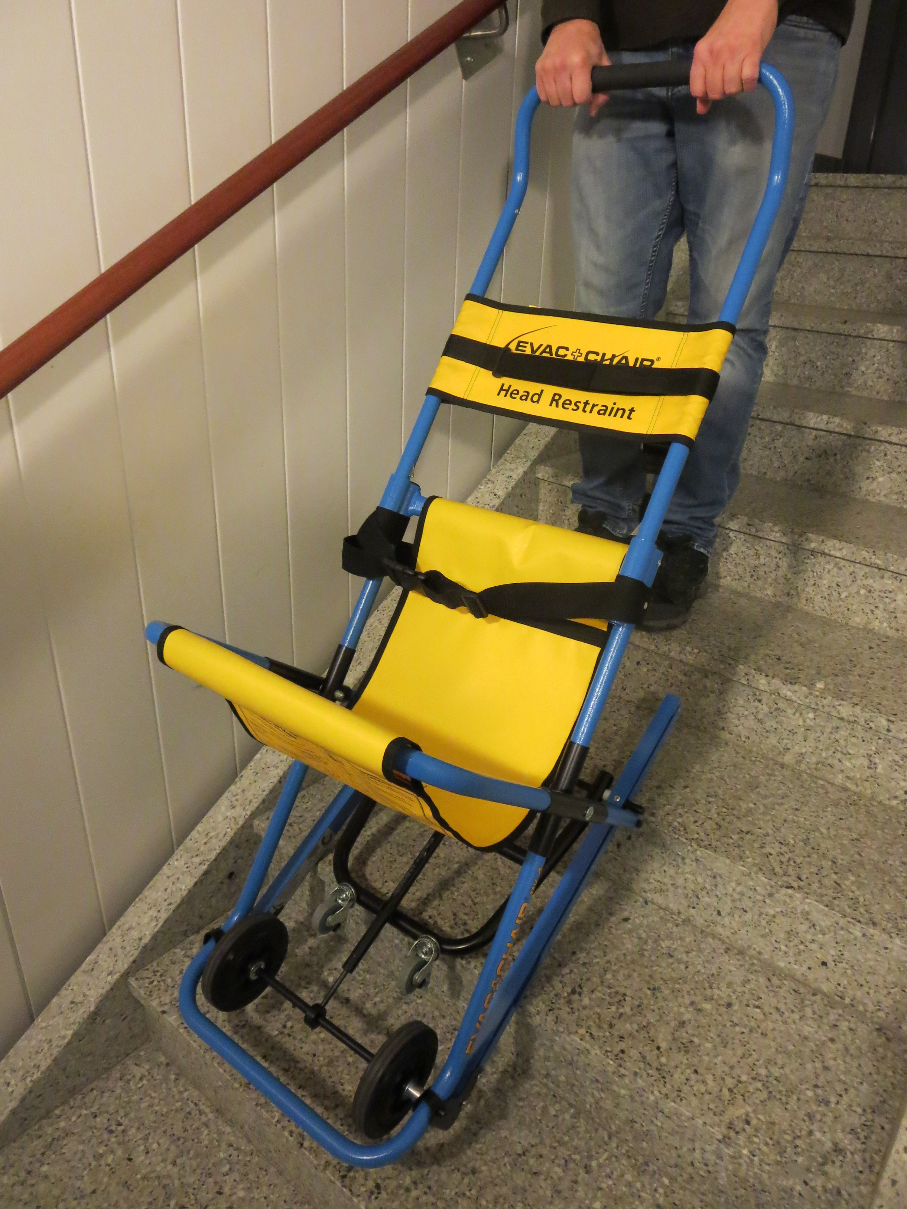 Evac+Chair evakuointituoli portaikko